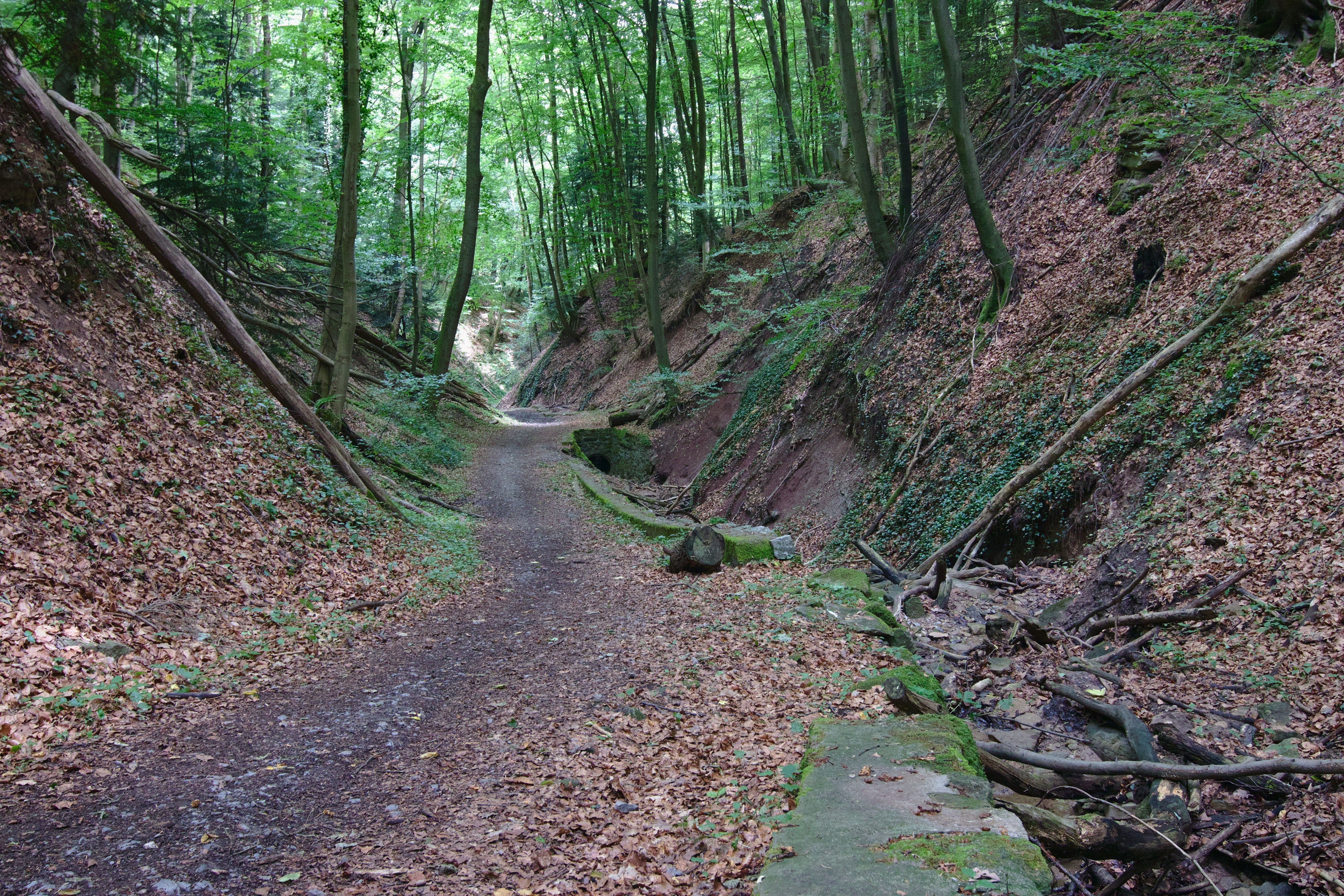 Oberes Ende der Falschen Klinge, eines Kerbtals bei Stuttgart.